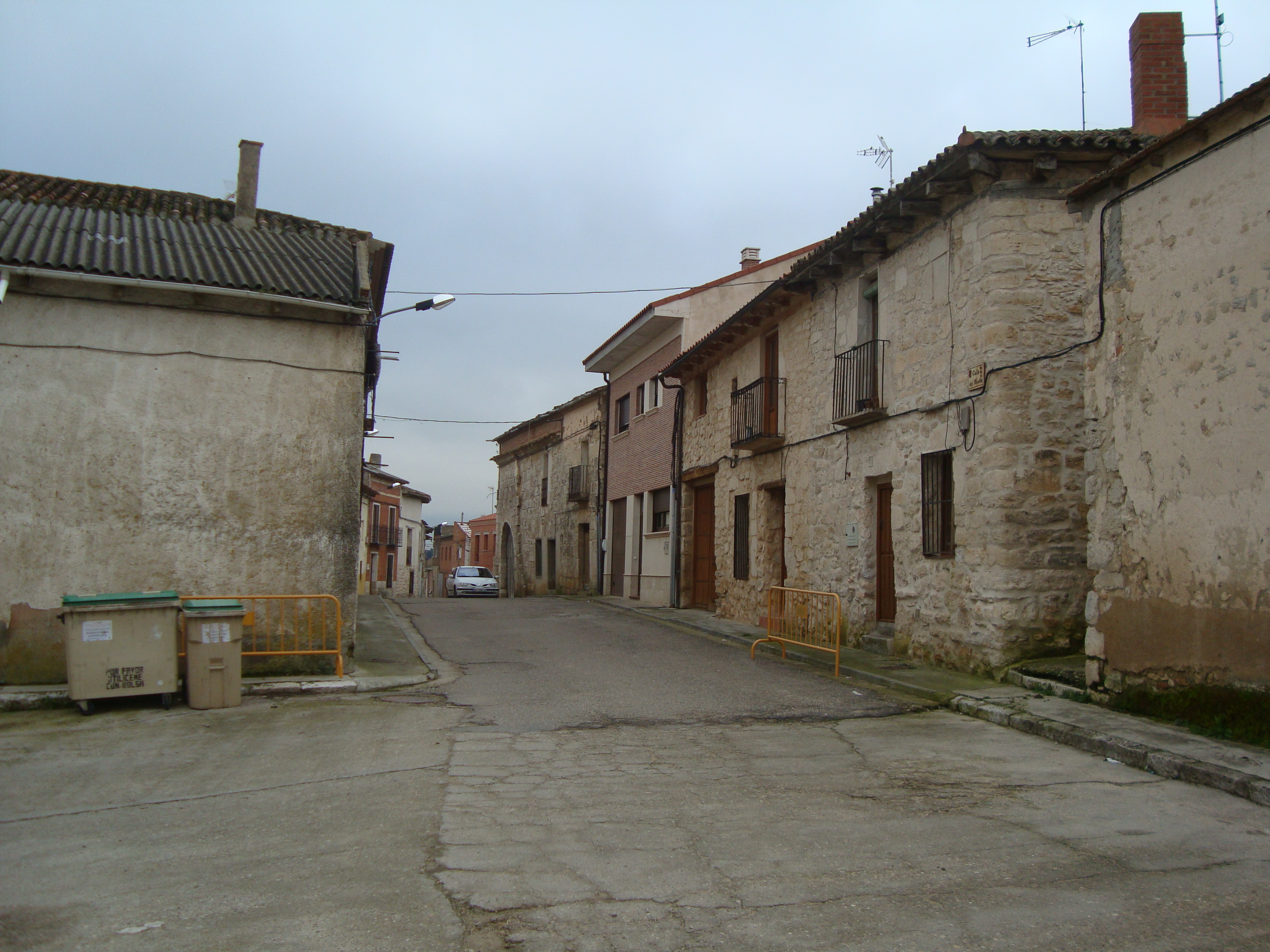 Calle de la localidad de Ciguñuela (Valladolid).